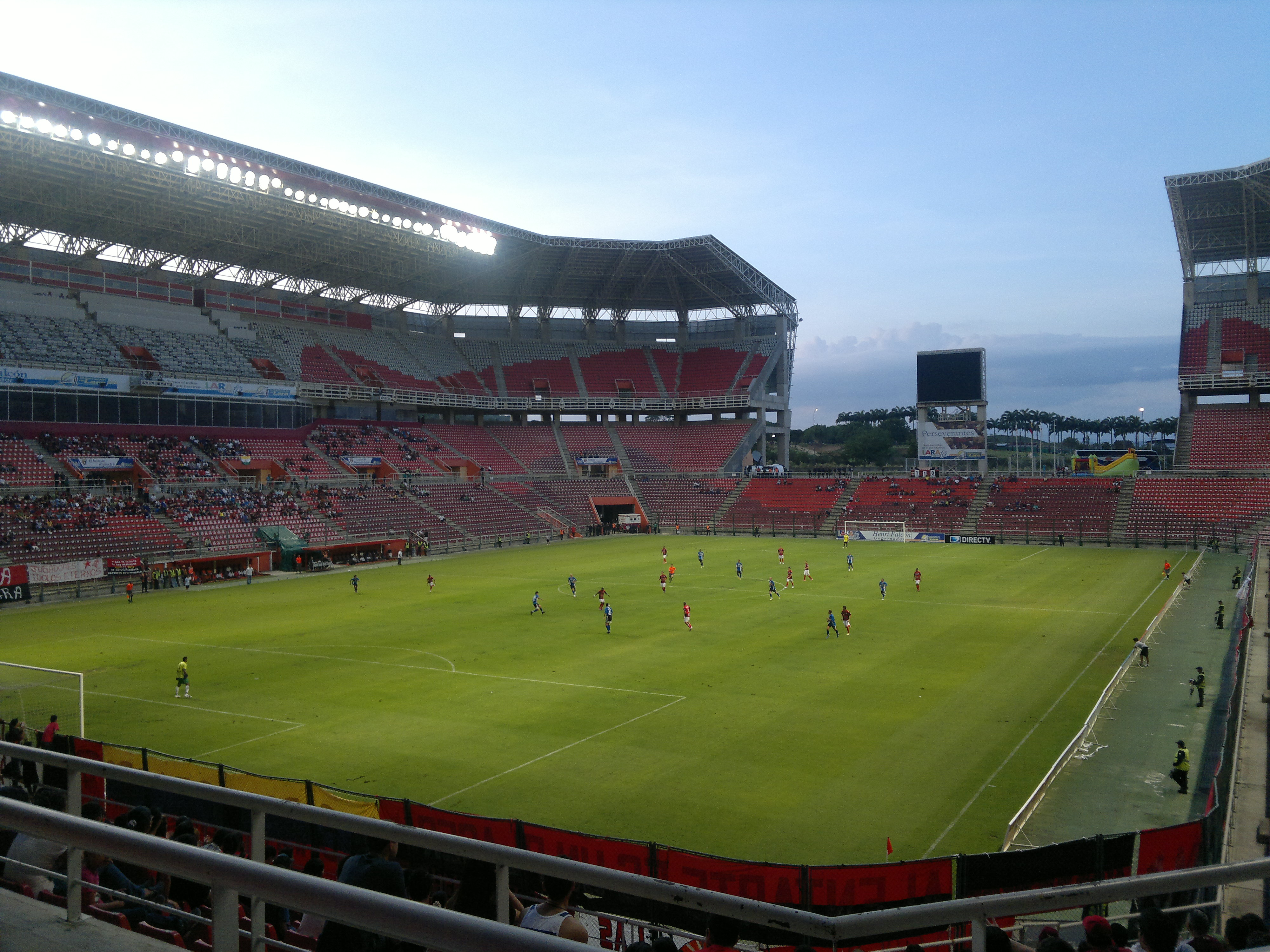 Estadio Metropolitano de Cabudare